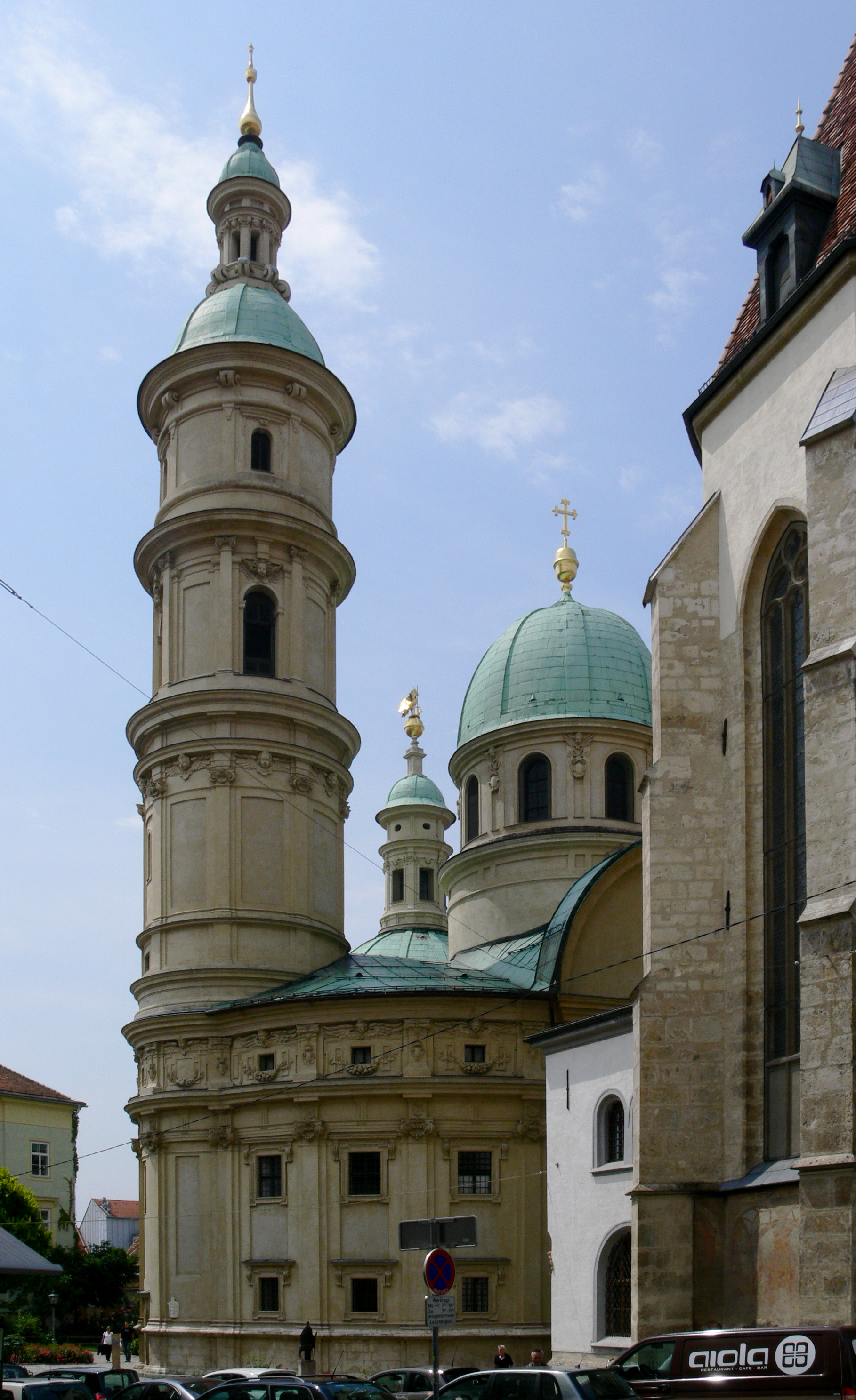 Grza, Mausoleum (links) und Chor des Doms (rechts)